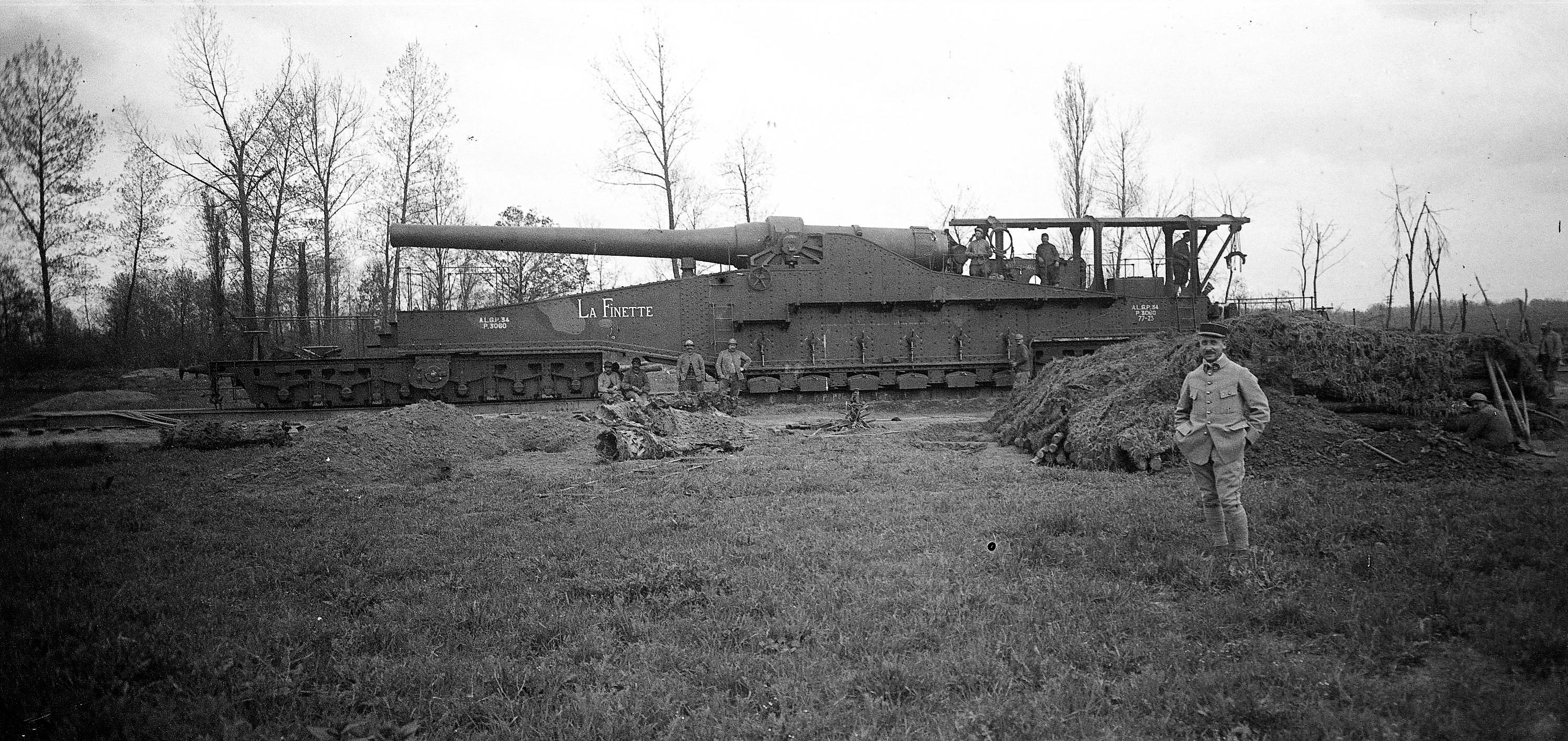 ".... boche Perort. f. 6.3 1/10" Canon de calibre 340 appelé "la Finette" entre Missy-sur-Aisne et Condé-sur-Aisne (Aisne). 1918. Guerre 1914-1918.